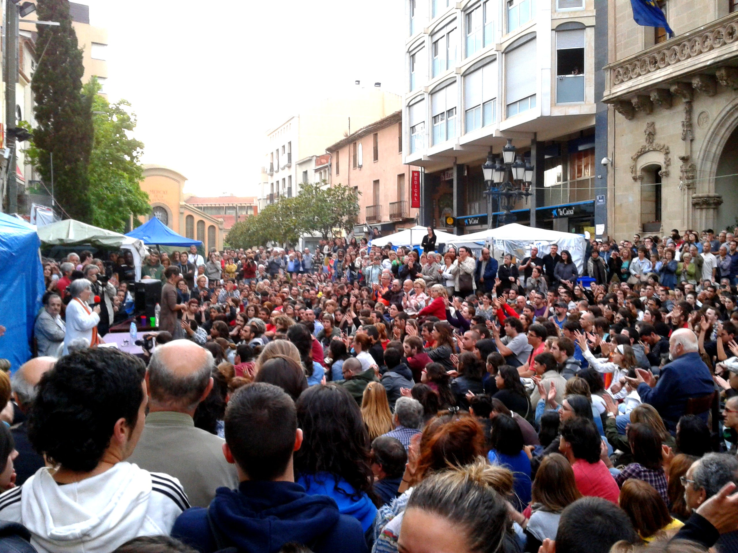 Miren Etxezarreta oferint una xerrada al Raval de Montserrat de Terrassa durant l'acampada del 15M (2011)